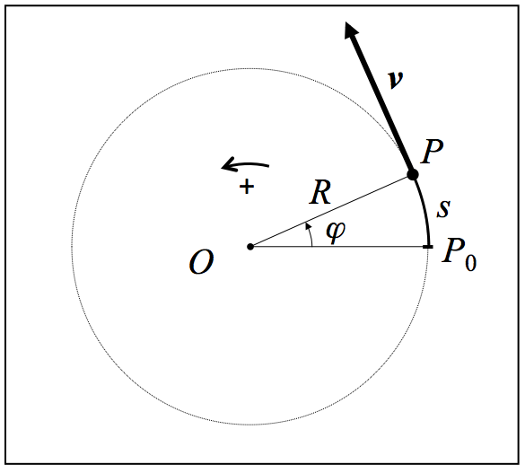 Higidura zirkularraren elementuak eta ezaugarriak adierazten dituen grafiko eskematikoa.